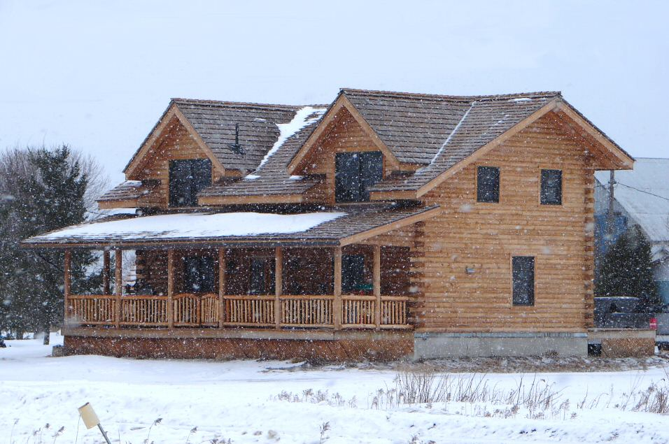 Modern log home